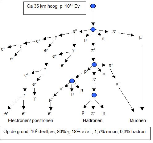 Gerbe de rayons cosmiques.